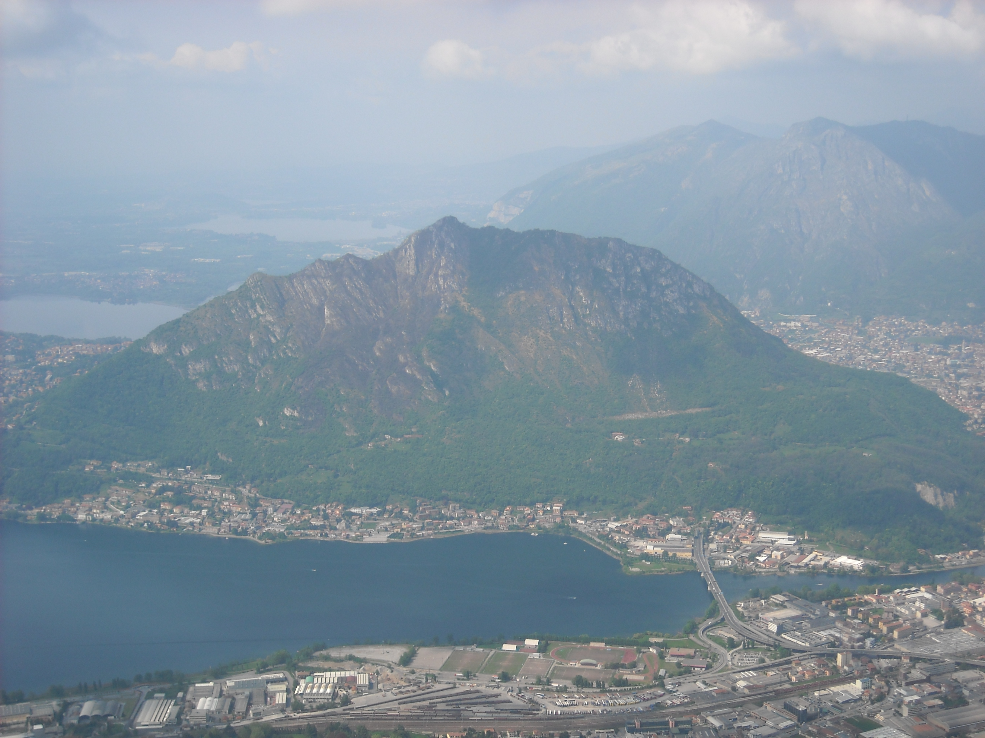 Monte Barro dal Magnodeno.